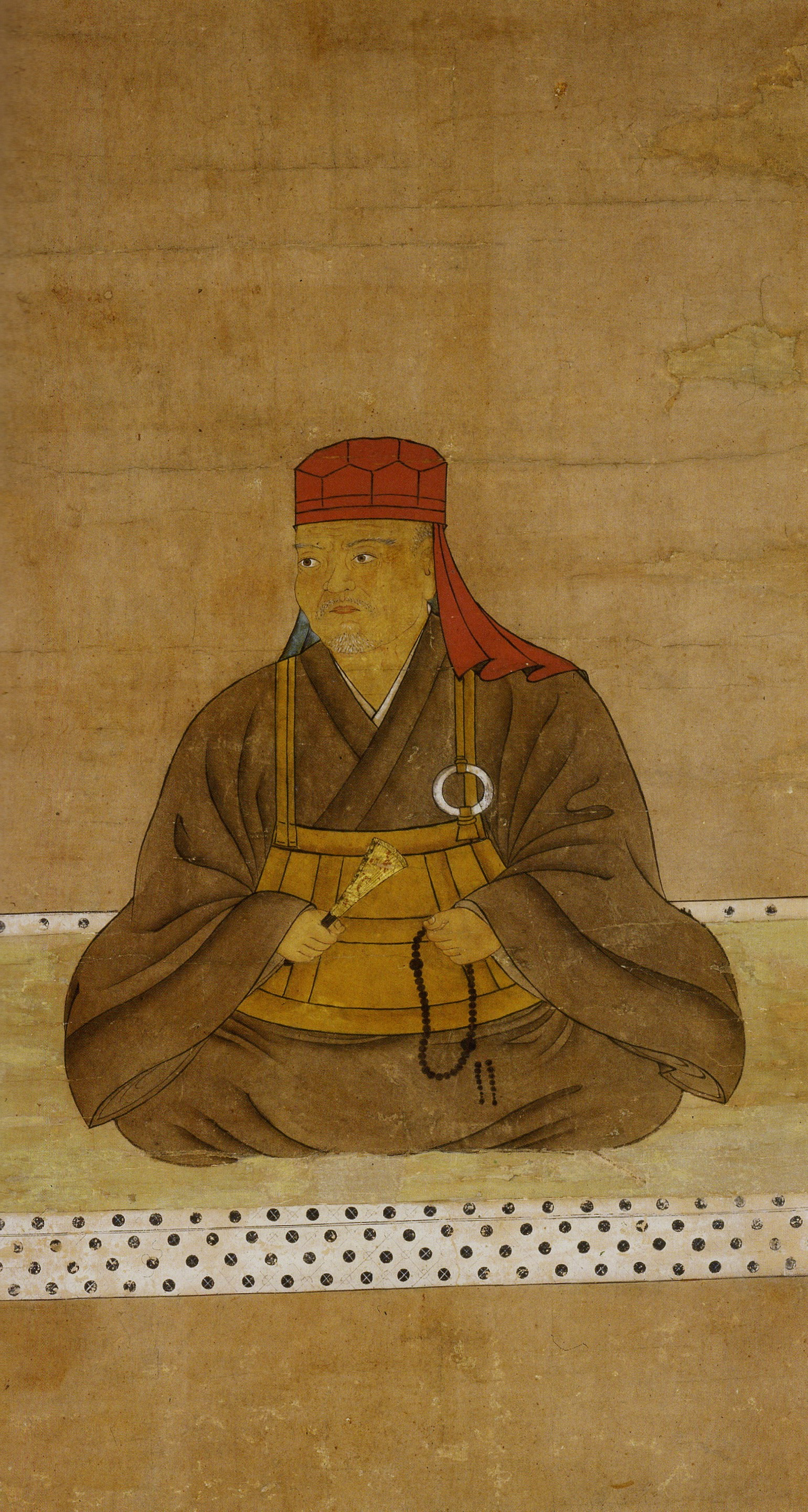 宇喜多忠家の肖像。